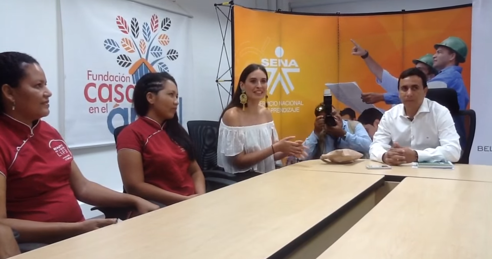 Taliana Vargas y su Fundación Casa en el Árbol Firman Alianza con el SENA Programa "Belleza por un Futuro"